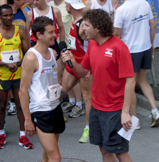 Interview mit Jonathan Wyatt beim Graubünden-Marathon 2005